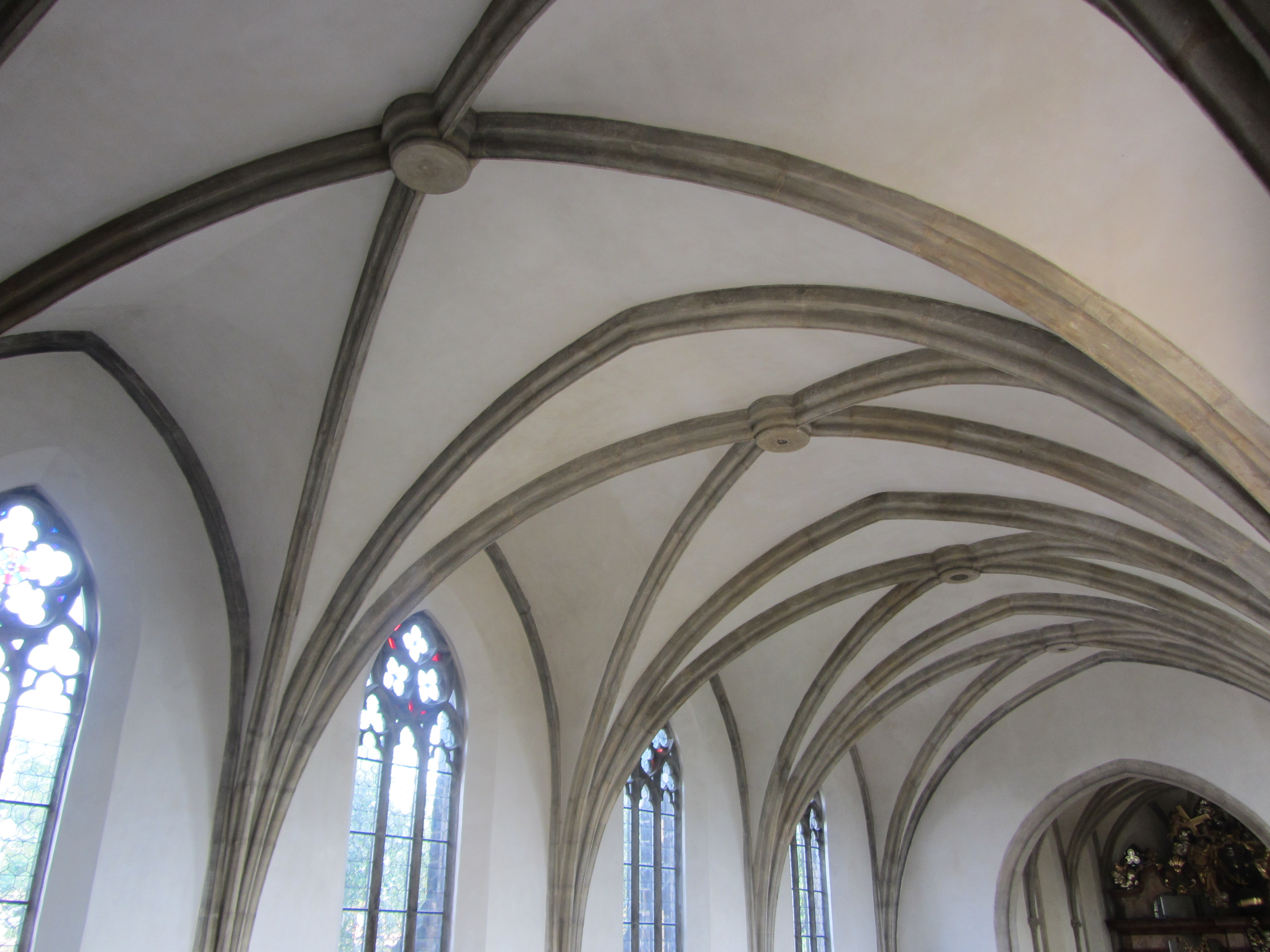 Pohled na klenbu lodi z kruchty